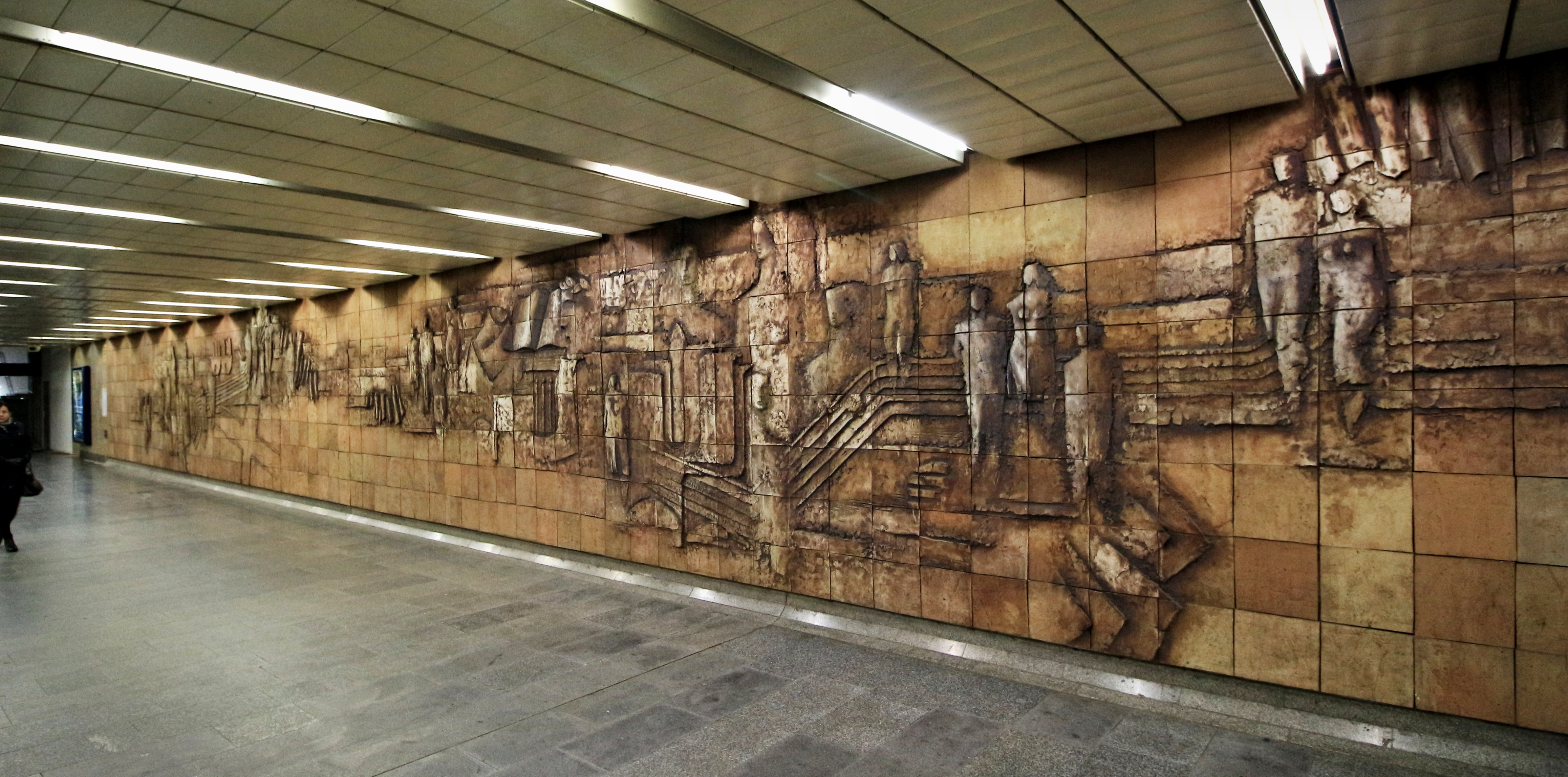 Stanice pražského metra, trasa B, Můstek